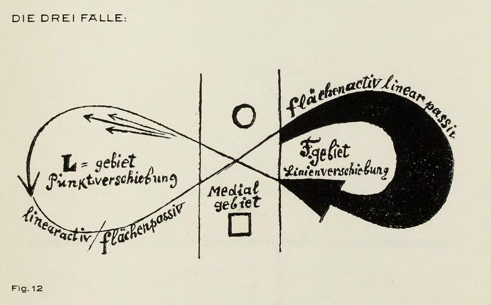 Paul Klee: Aus dem Pädagogischen Skizzenbuch, Seite 11: Aktive, mediale und passive Linie Bauhaus Dessau 1924/25